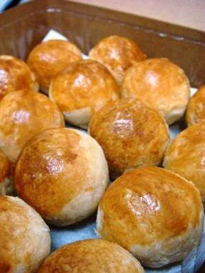 Tambun Biscuit in Penang